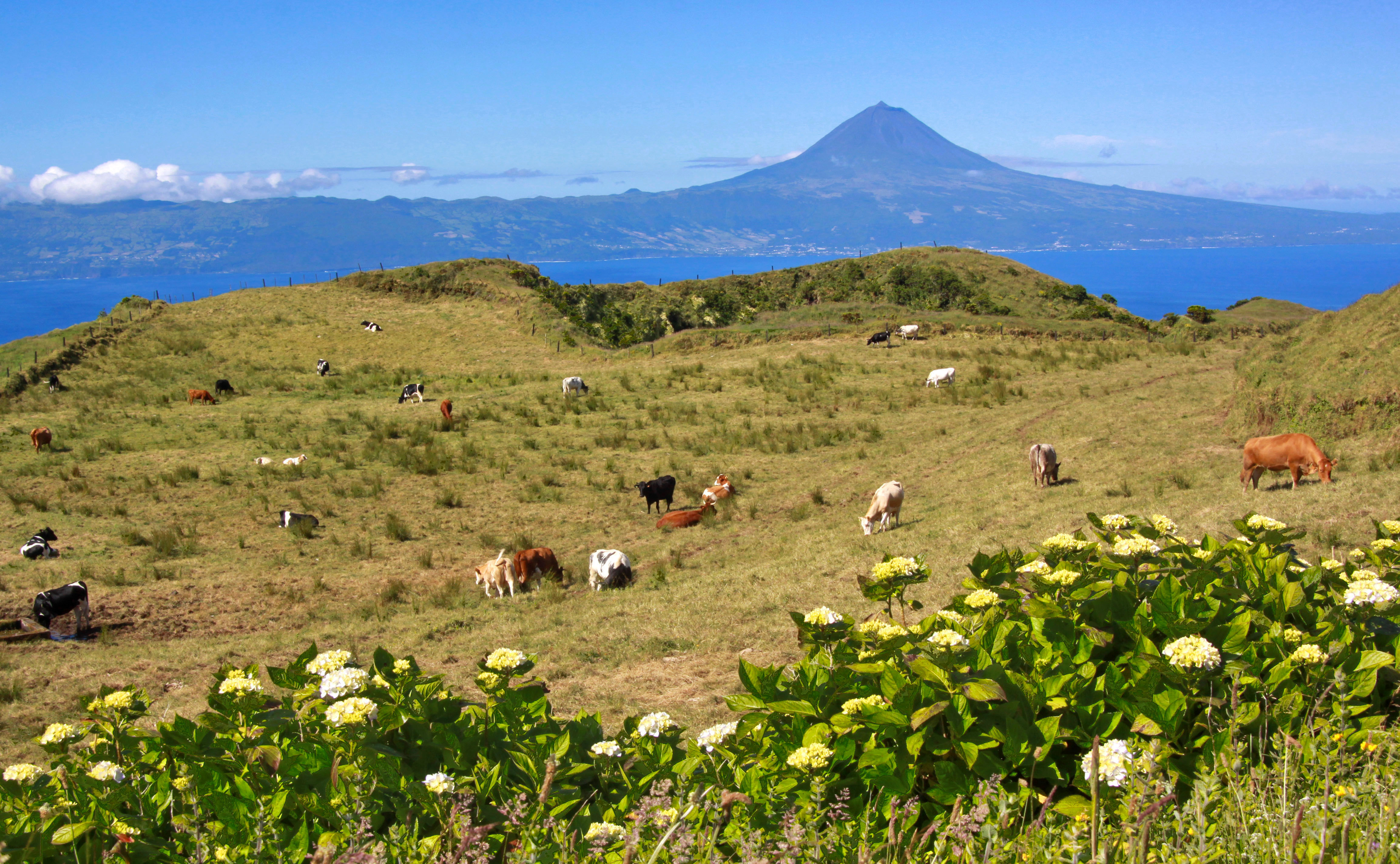 Ilha de São Jorge, Açores. Vue côté sud vers le Pico.